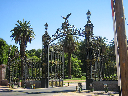 Main gates, General San Martin Park. Mendoza, Argentina.